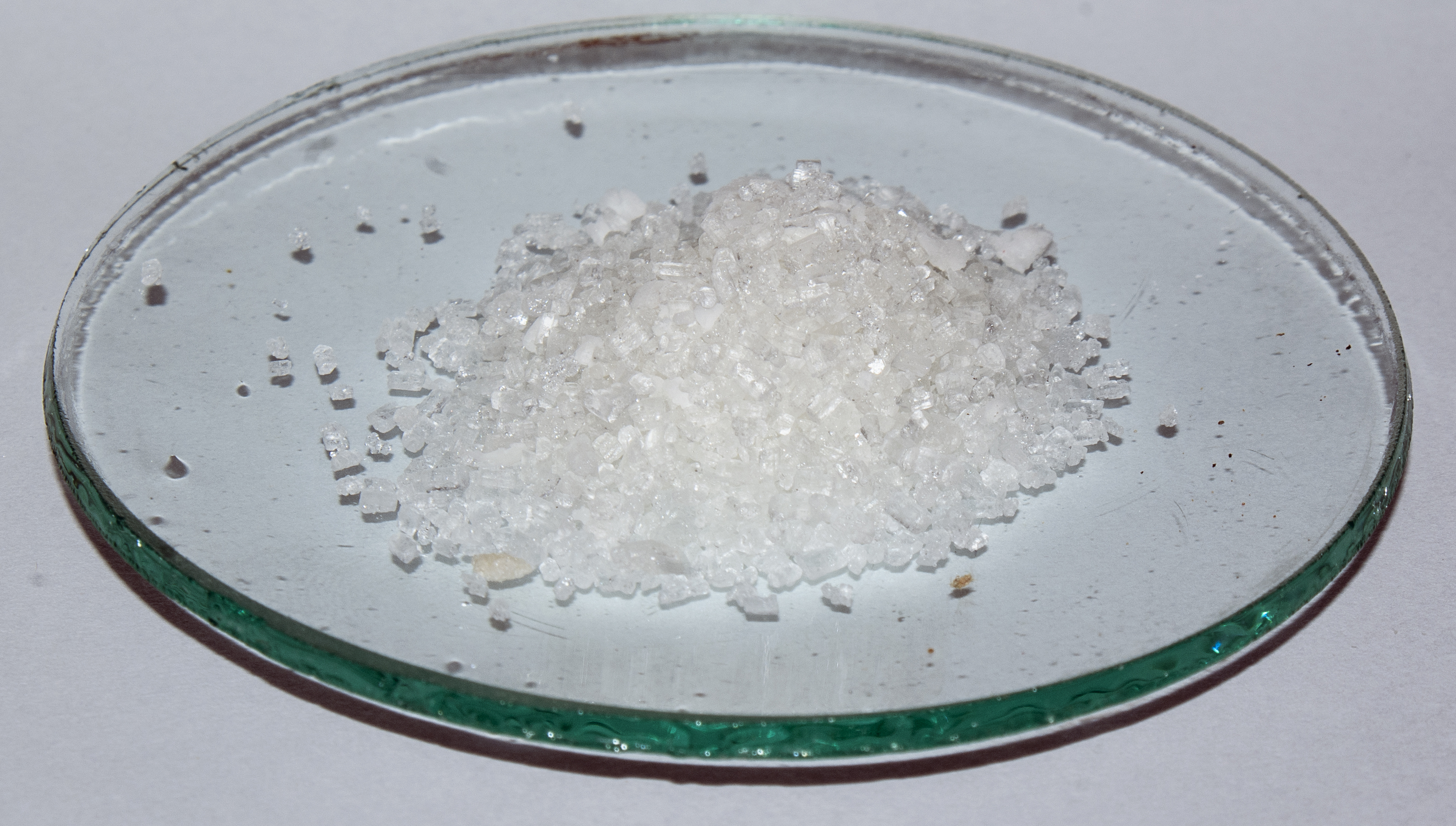 Kryształki tiosiarczanu sodu.